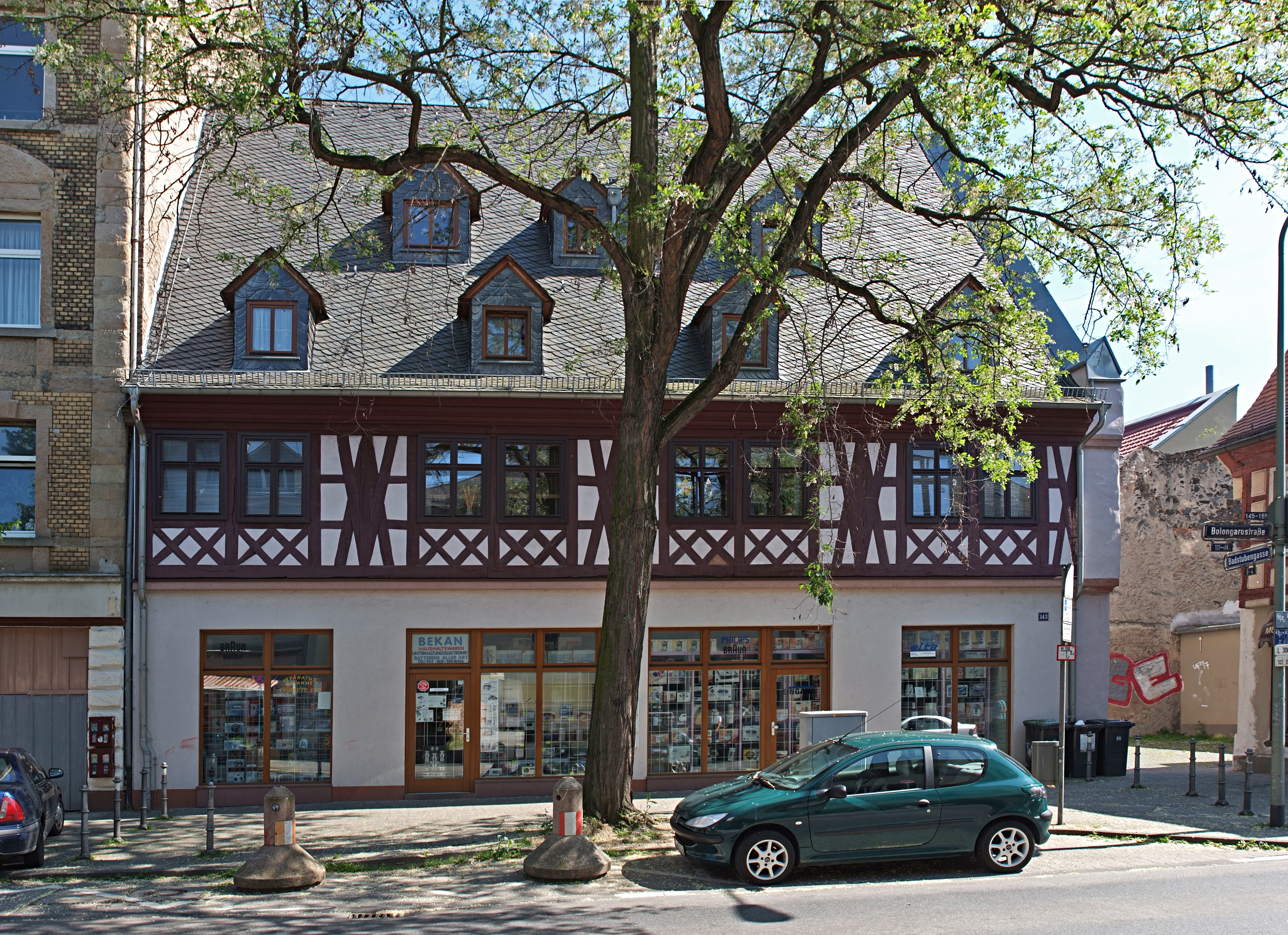 Bolongarostraße 143, Konventsgebäuse des Antoniterklosters